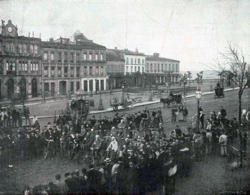 Départ du premier Bordeaux-Paris, en 1891. 23 mai 1891, 5 heures du matin, devant le café-concert L'Alcazar (visible à gauche), 13 place du Pont (place Stalingrad depuis 1946) à La Bastide, Bordeaux, Gironde, France. Toutes les maisons subsistent en 2018.